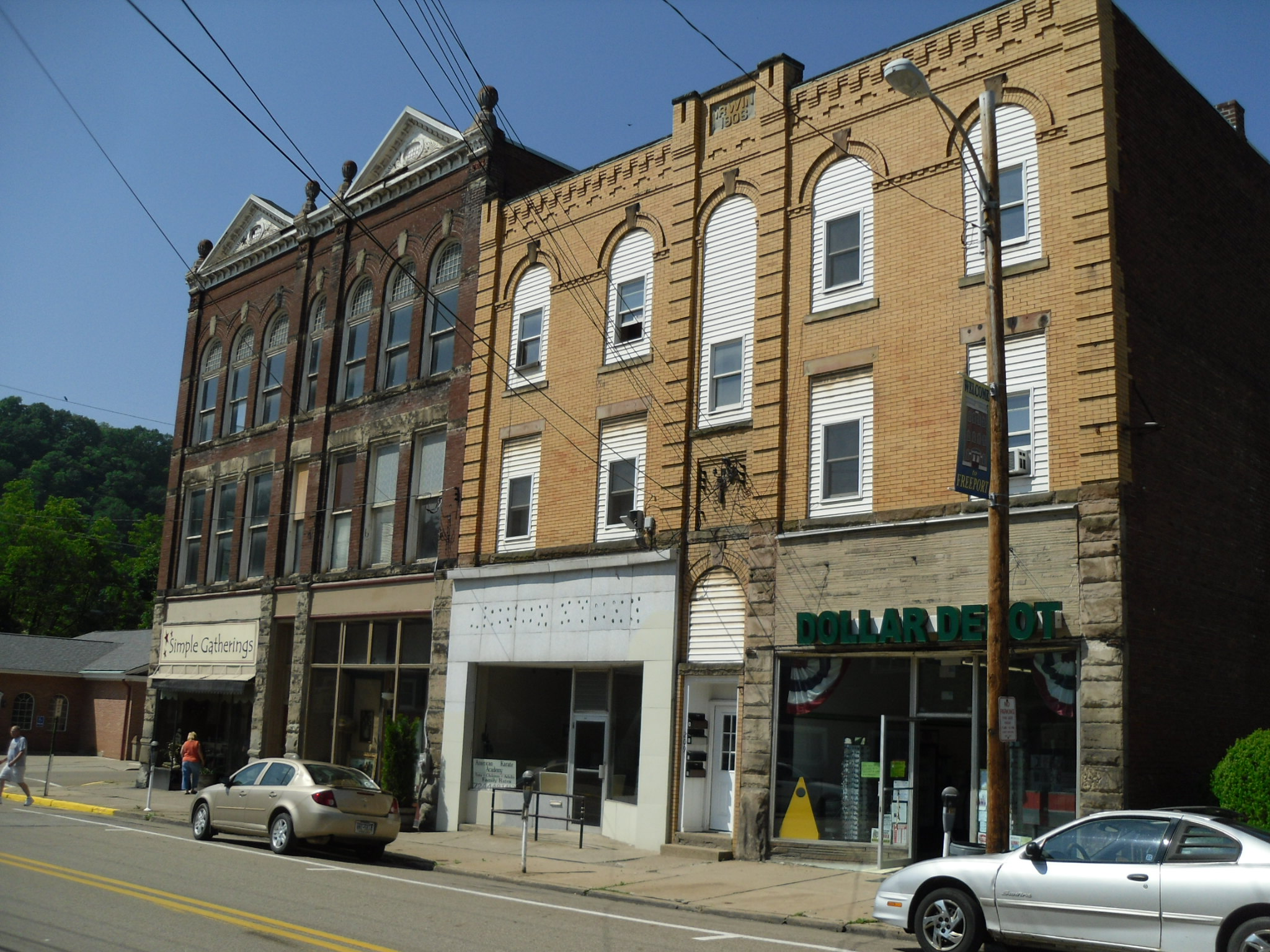 Freeport, Pennsylvania